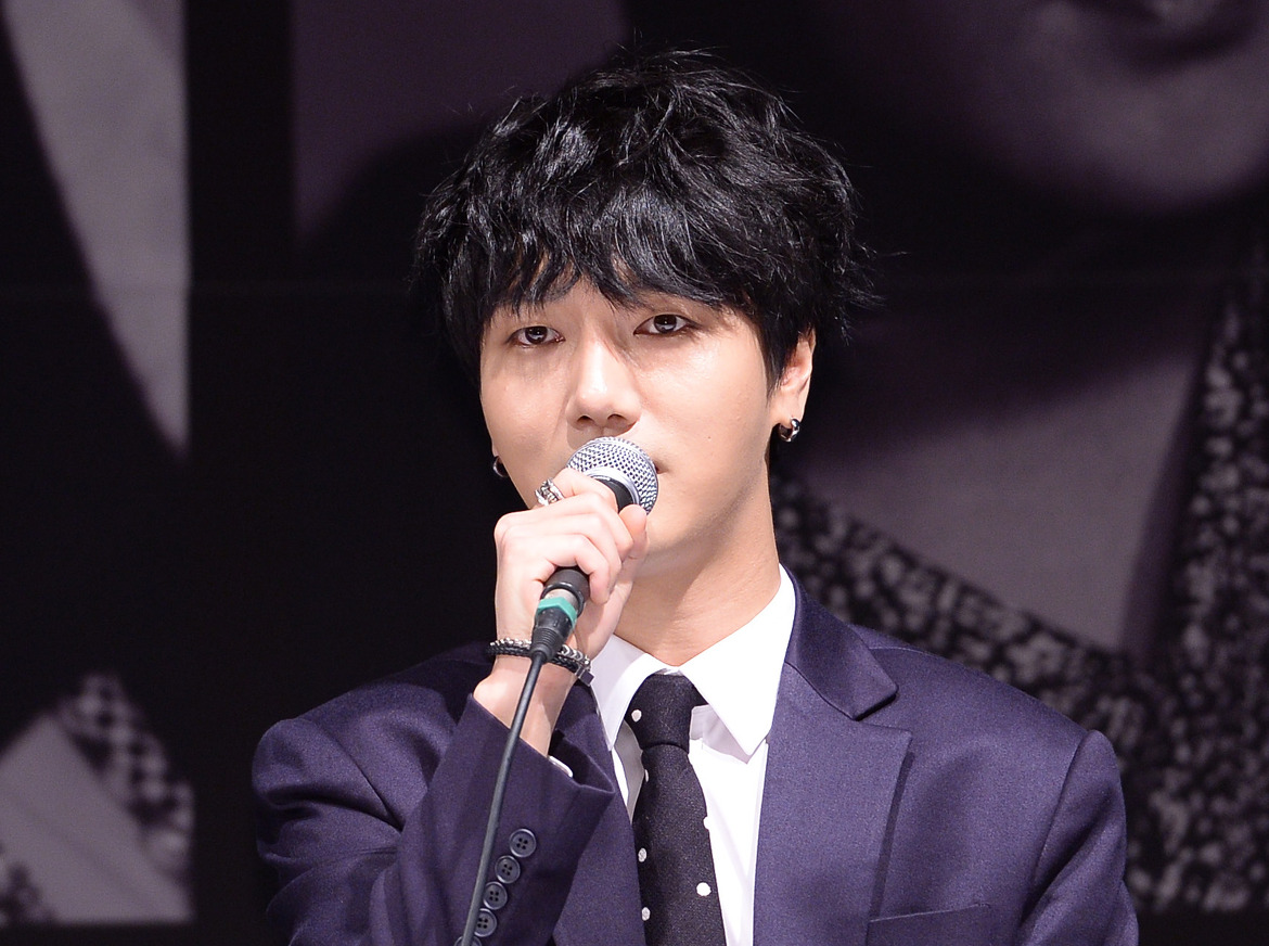 슈퍼주니어 멤버들이 15일 오후 서울 강남구 삼성동 코엑스 아티움에서 열린 스페셜 앨범 'Devil' 발매 기념 기자회견에서 인사를 하고 있다. 2015.07.15 / 이석우 기자